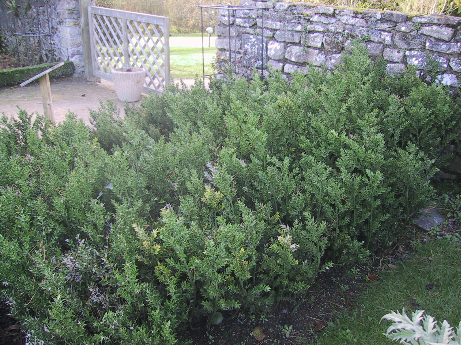 Ruscus aculeatus bugelenn liliacea